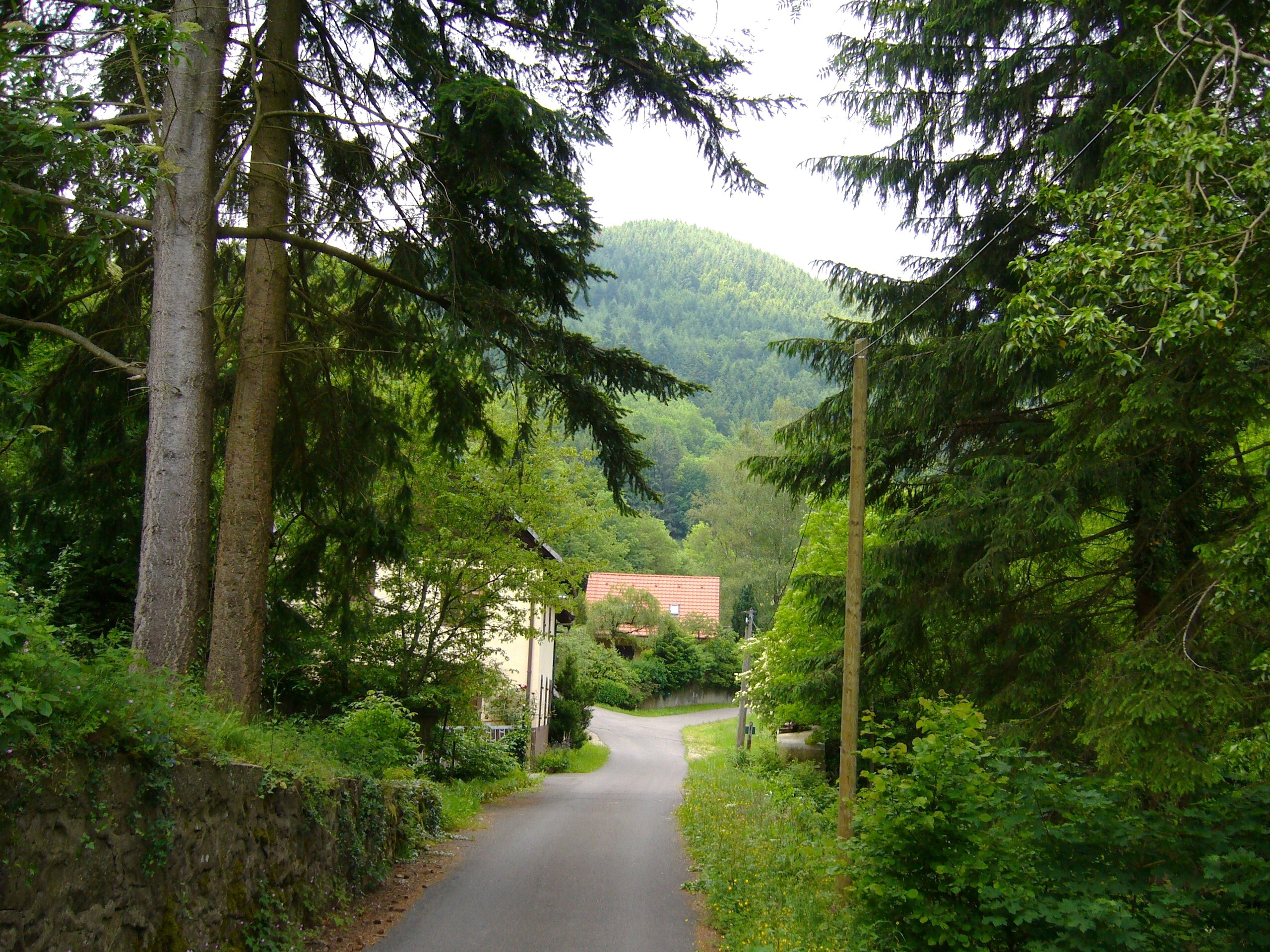 La Hingrie 016.JPG